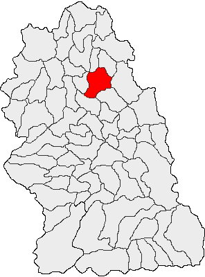 Categorie:Hărţi ale judeţului Hunedoara